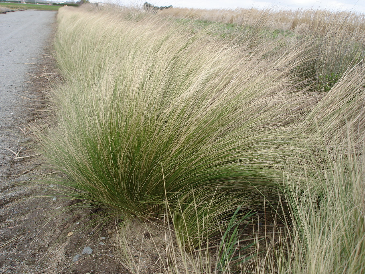 Species Stipa tenuifolia